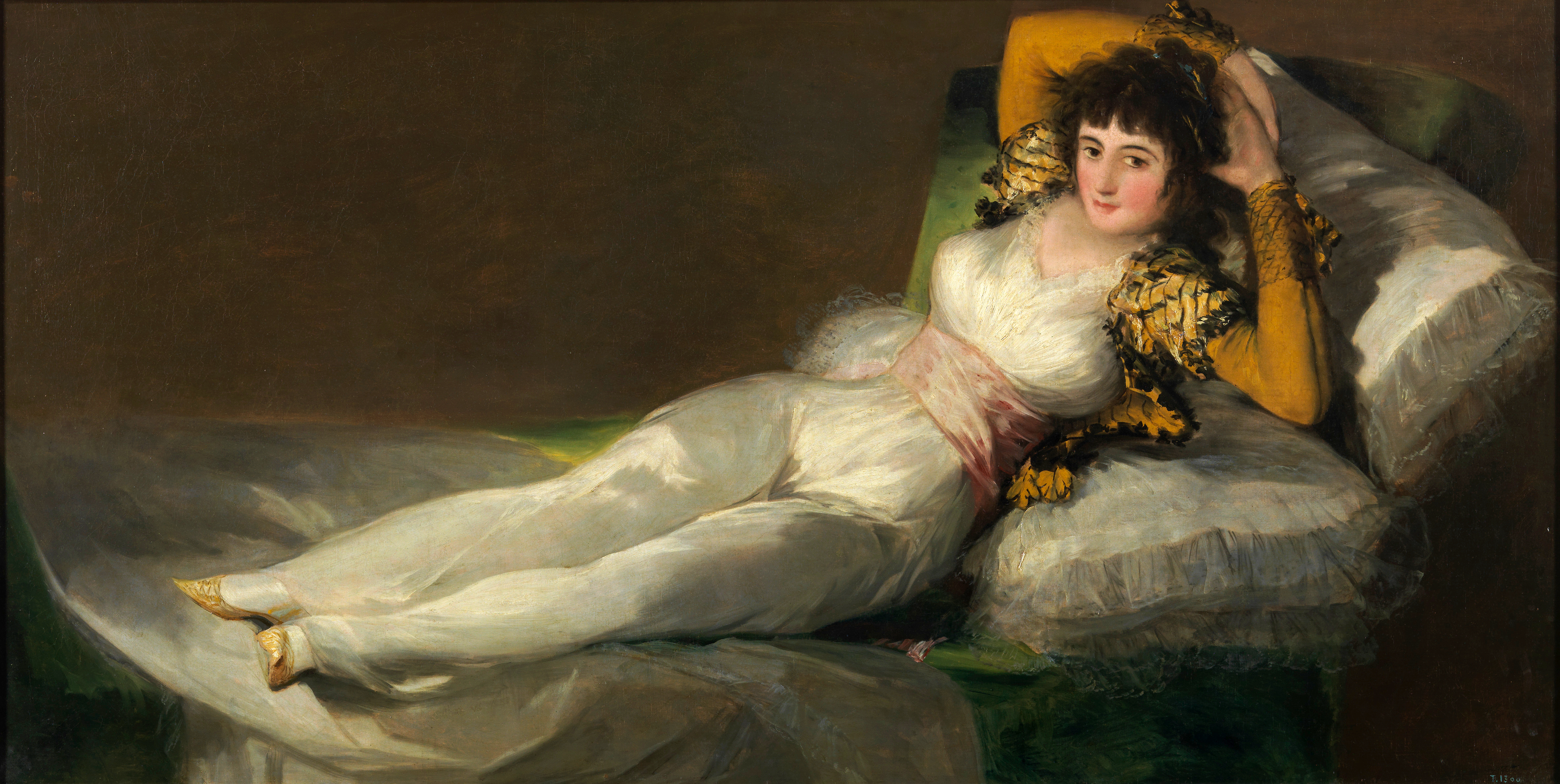 La maja vestida, 1800-1807, óleo sobre lienzo, 95 × 190 cm.